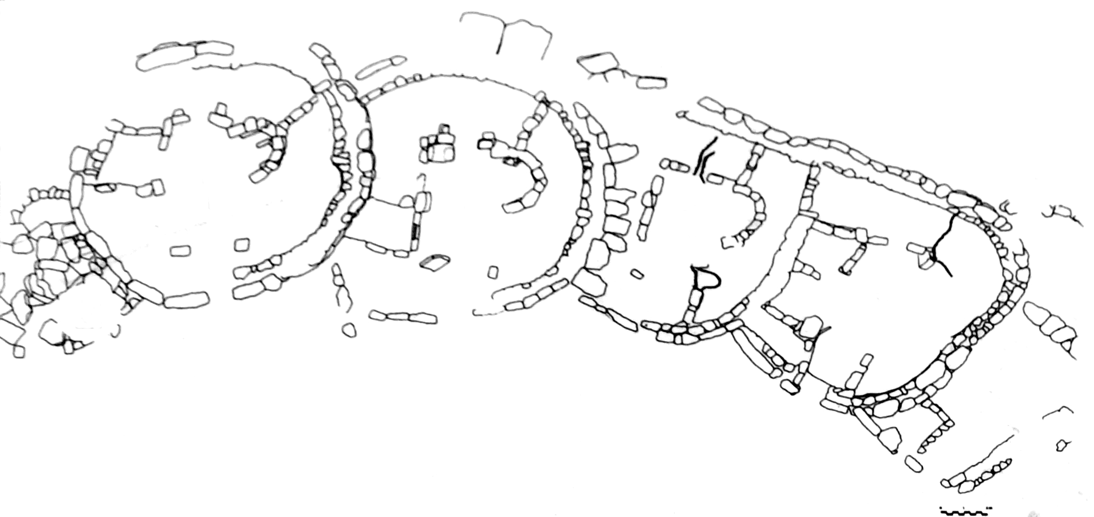 Die talayotische Siedlung Sant Vicenç d’Alcaidús, Menorca. Grundriss der ausgegrabenen Wohnhäuser (von der Schautafel an der Fundstätte).